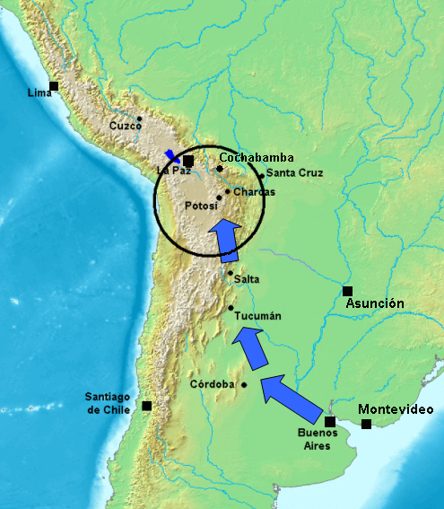 Mapa del Ejército del Norte (1810-1820). Ubicación del Alto Perú